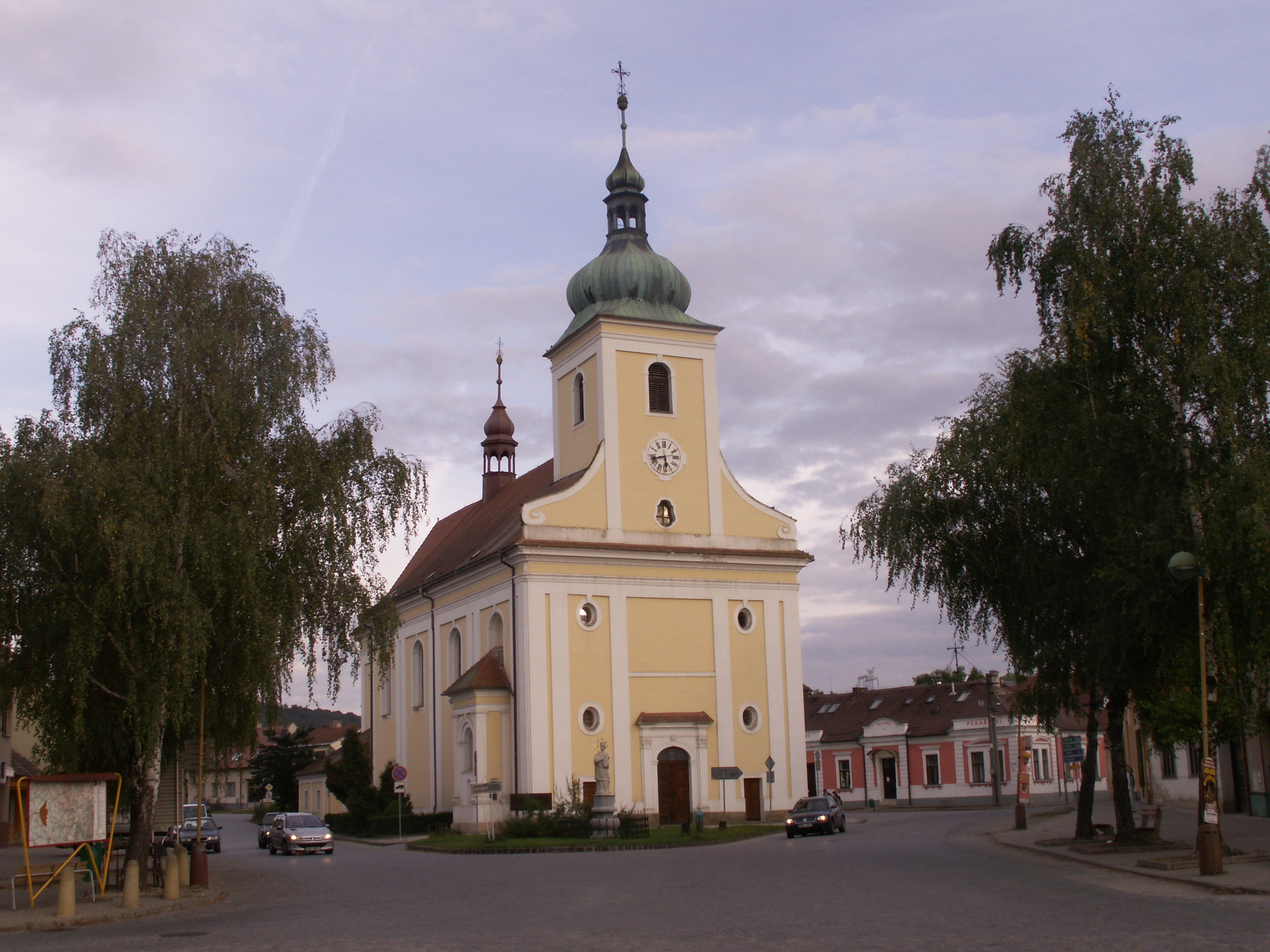 kostel Svatého Jakuba Většího, Veverská Bítýška, okres Brno-venkov